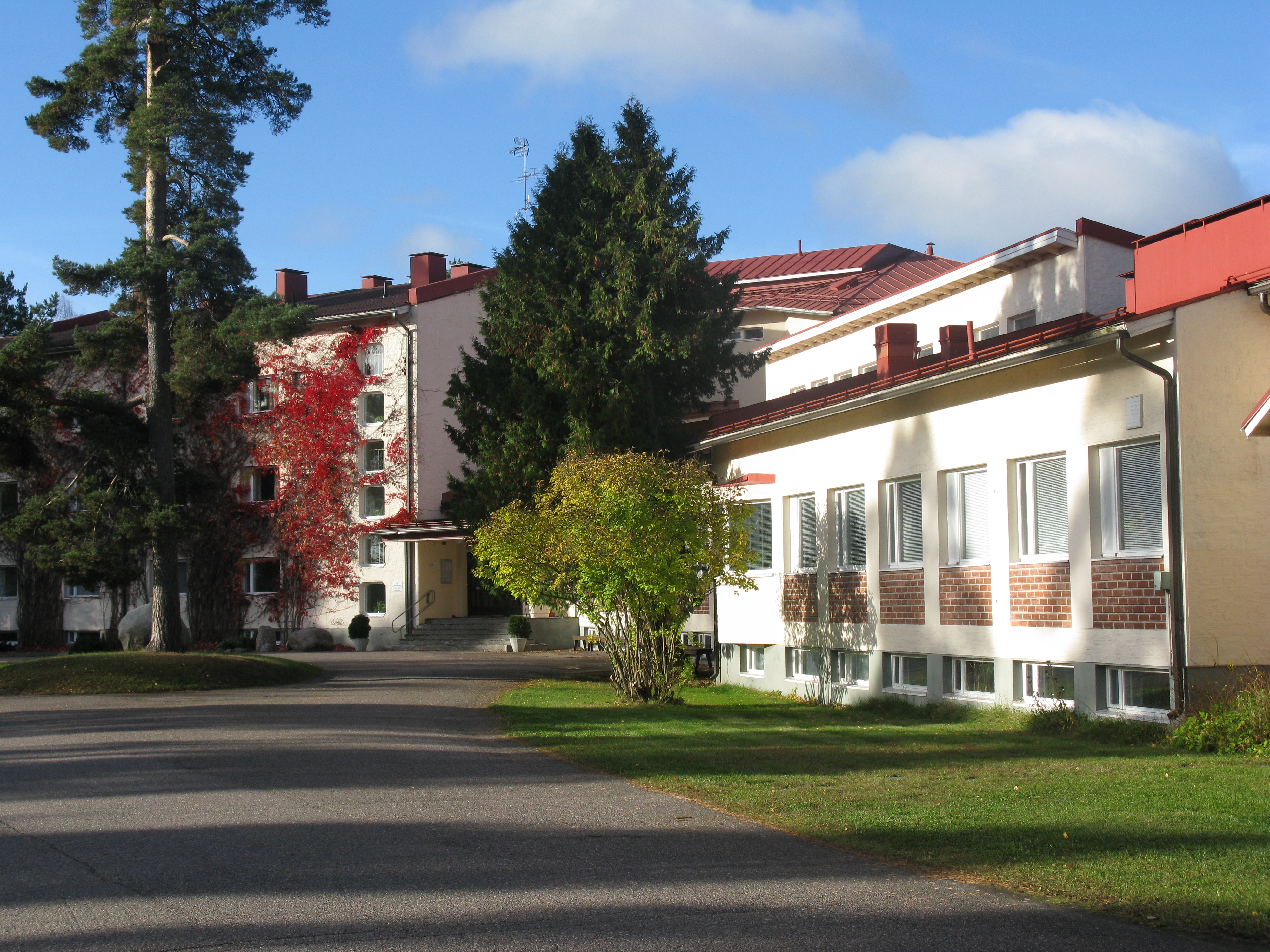 Jaakkiman opiston päärakennus